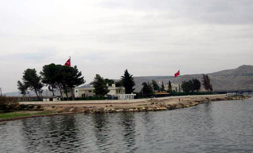 Tombeau de Suleiman Chah.